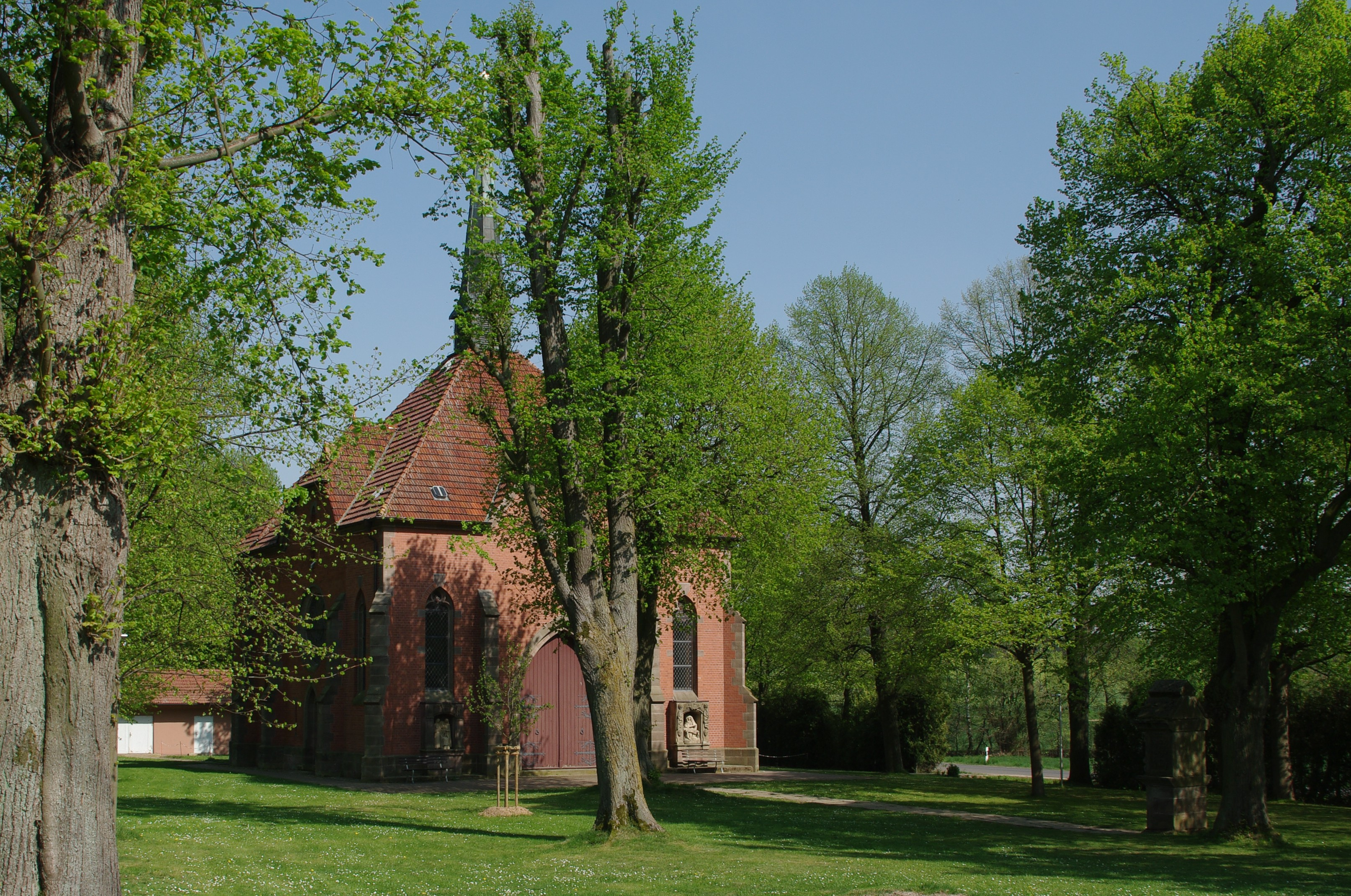 Die Wallfahrtskapelle Etzelsbach zwischen Steinbach und Hundeshagen im Landkreis Eichsfeld.